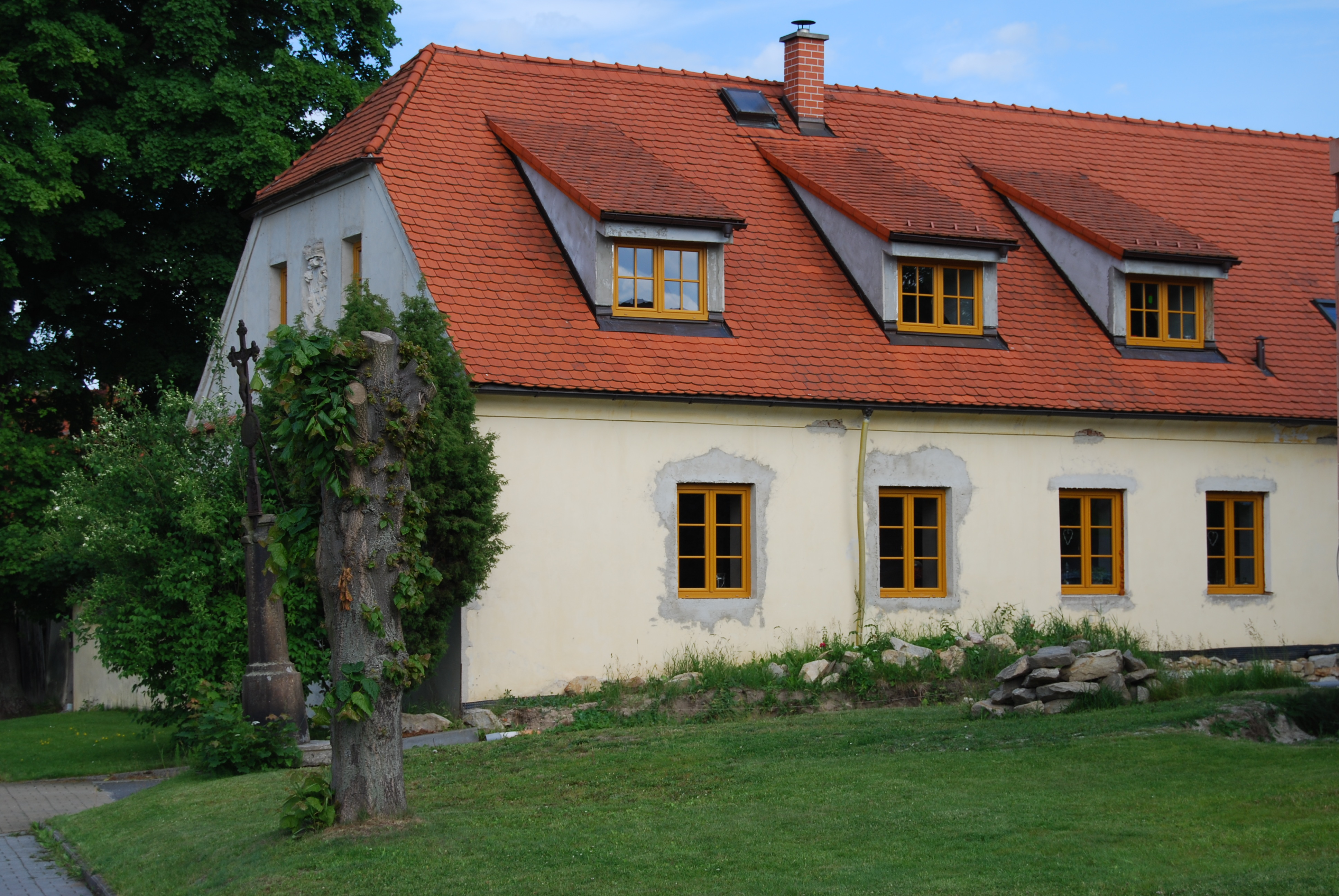 Dům čp. 41 v obci. Dobev je obec v Jihočeském kraji v okrese Písek. Česká republika.